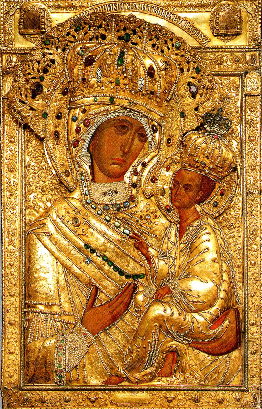 Тихвинская икона Божией Матери в окладе (Тихвин)